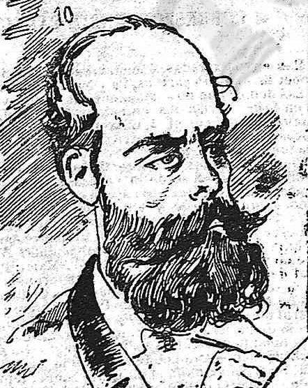 Luis Carreras.